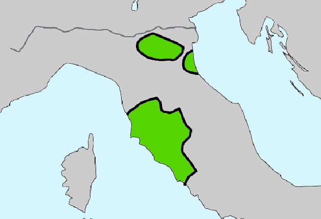 Expansion de la cultura de Villanova.